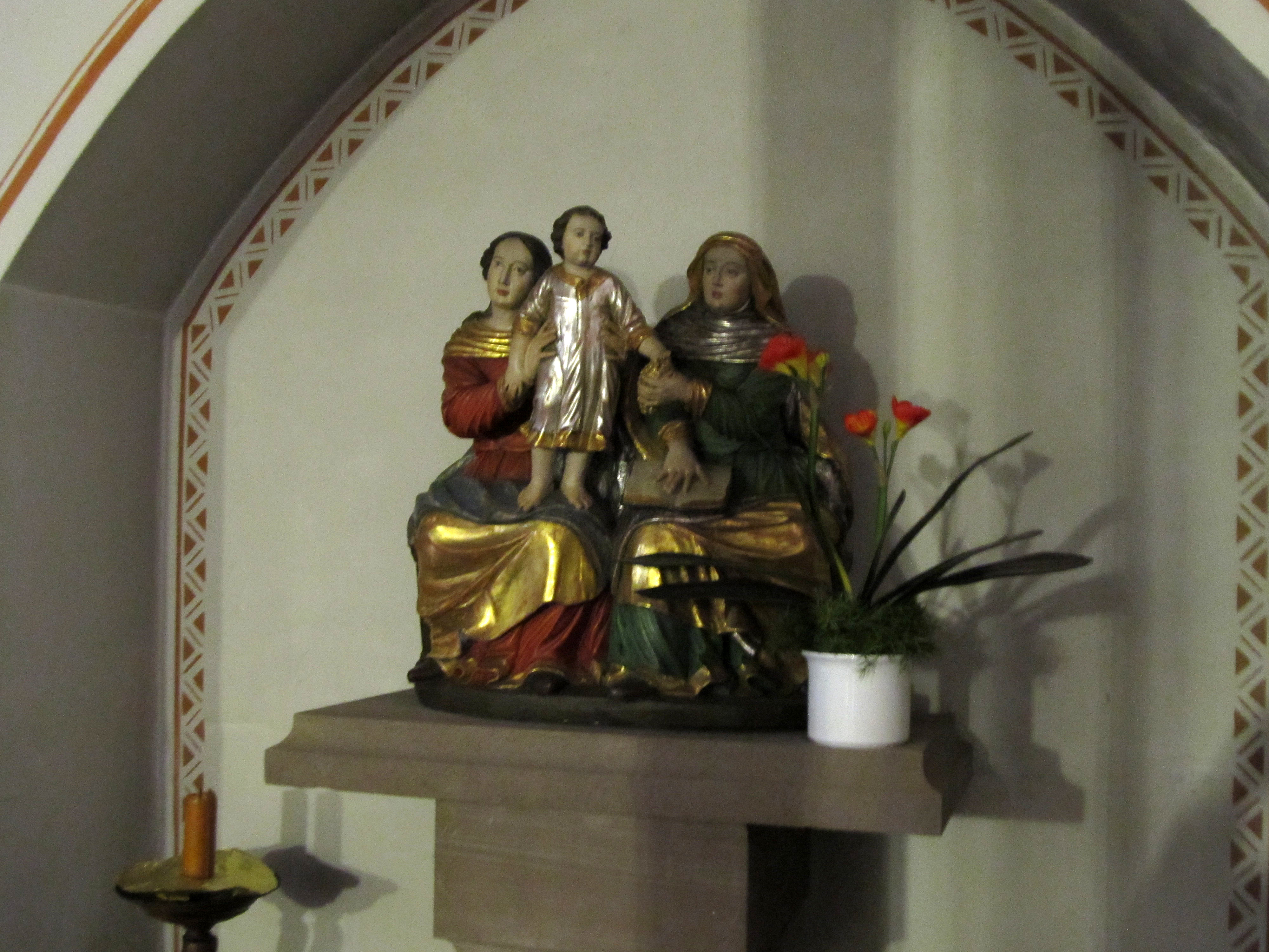 Figurengruppe "Anna Selbtritt" in der Pfarrkirche St. Anna in Biesingen, Saarland